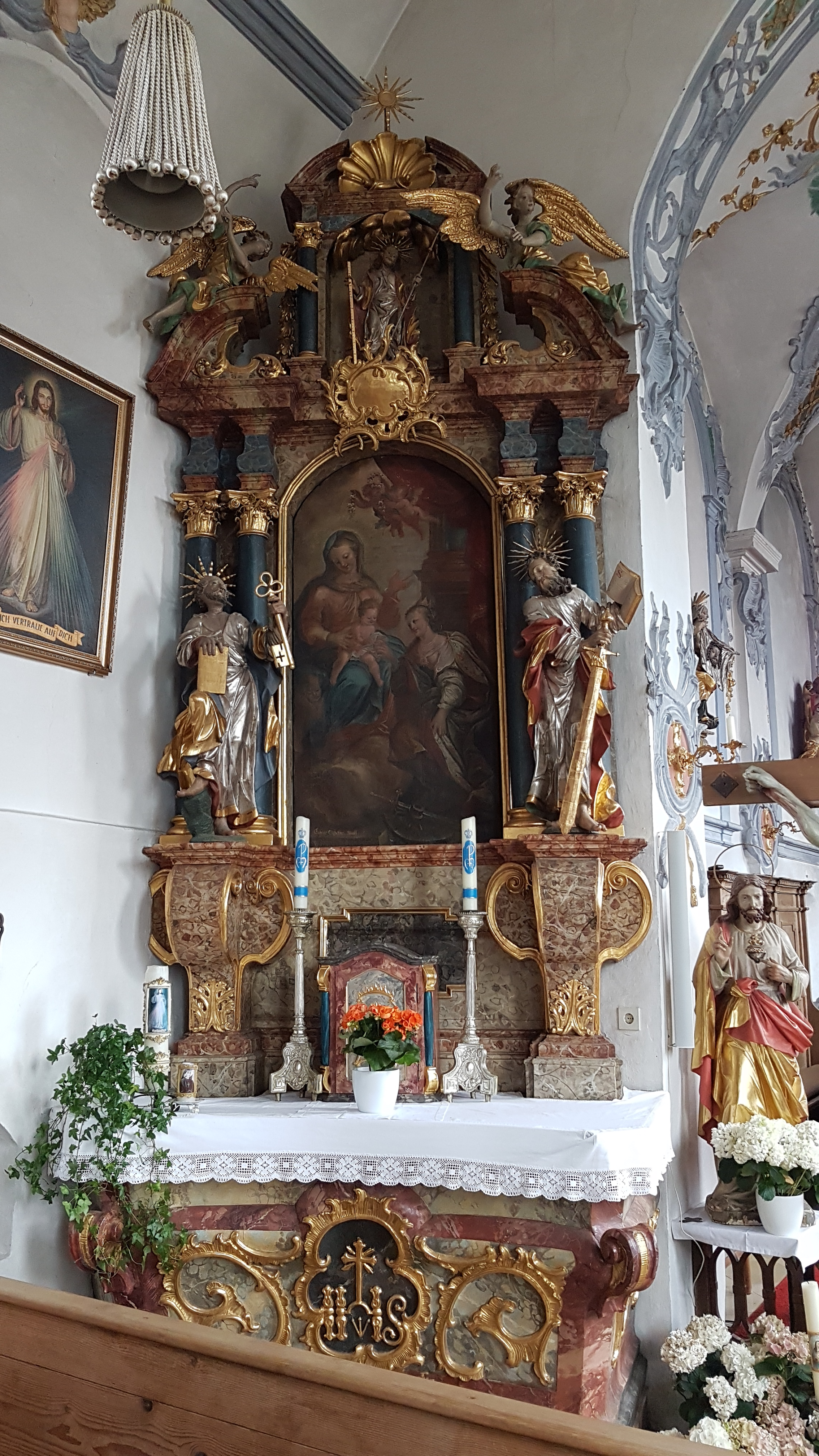 Oberfinning (Gmde Finning), Pfarrkirche Hl. Kreuz, linker Seitenaltar (nach 1700) mit figürlichen Schmuck von Lorenz und Johann Luidl.